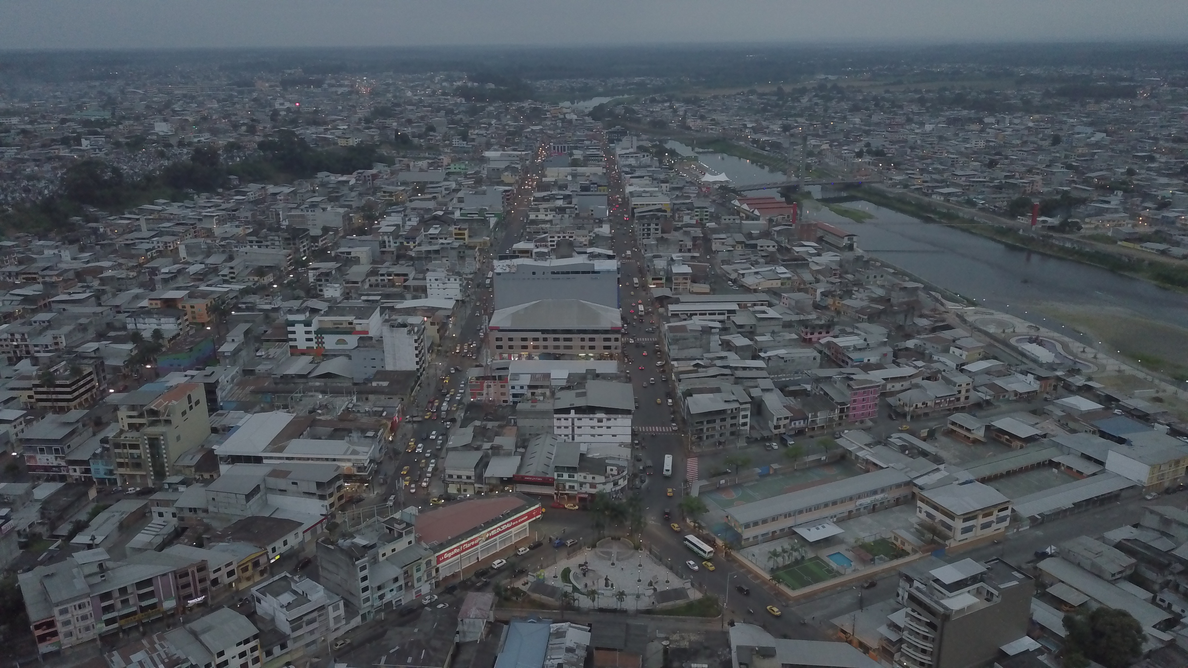 foto tipo 6h30 de la tarde